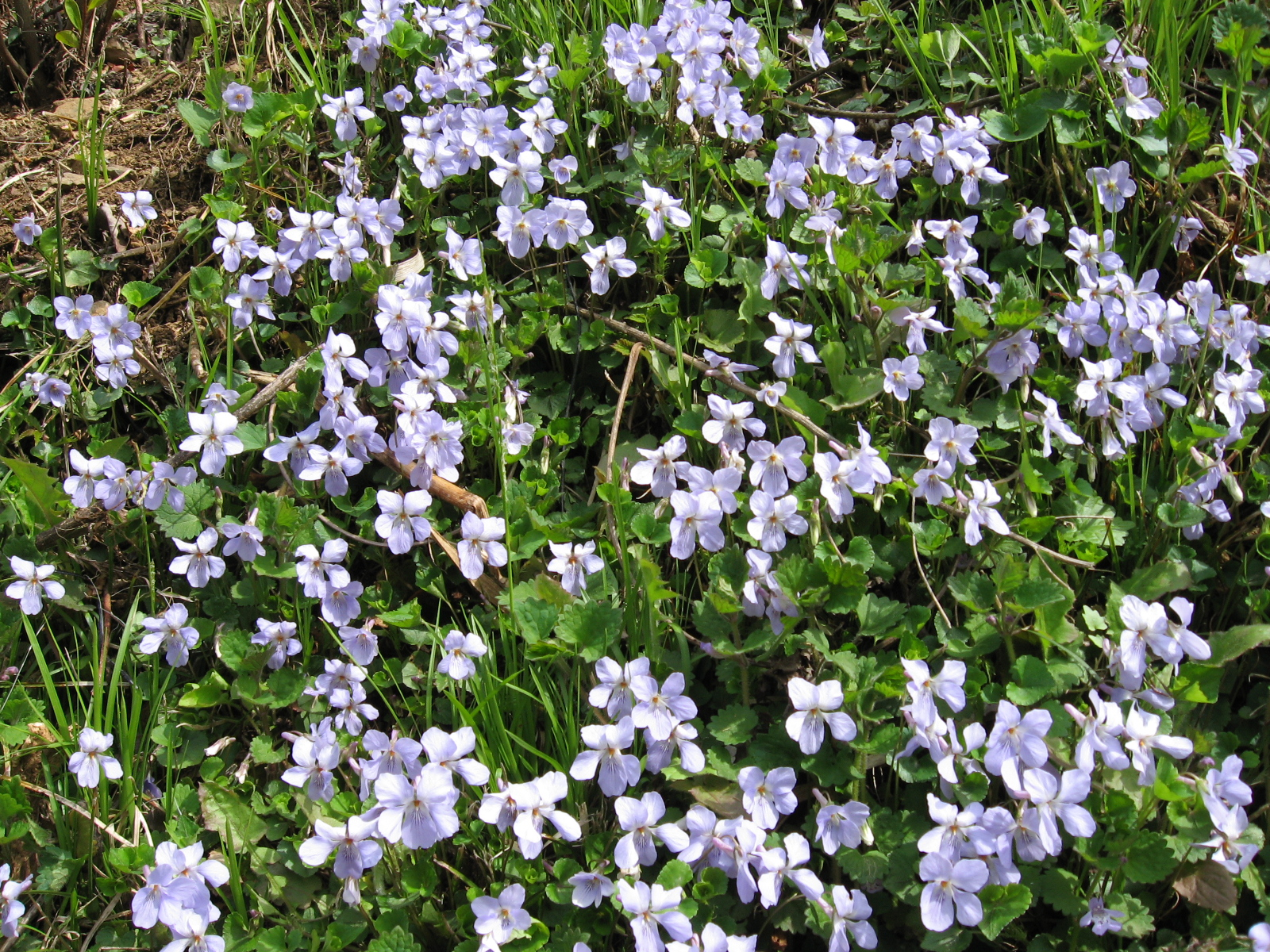 タチツボスミレの群落